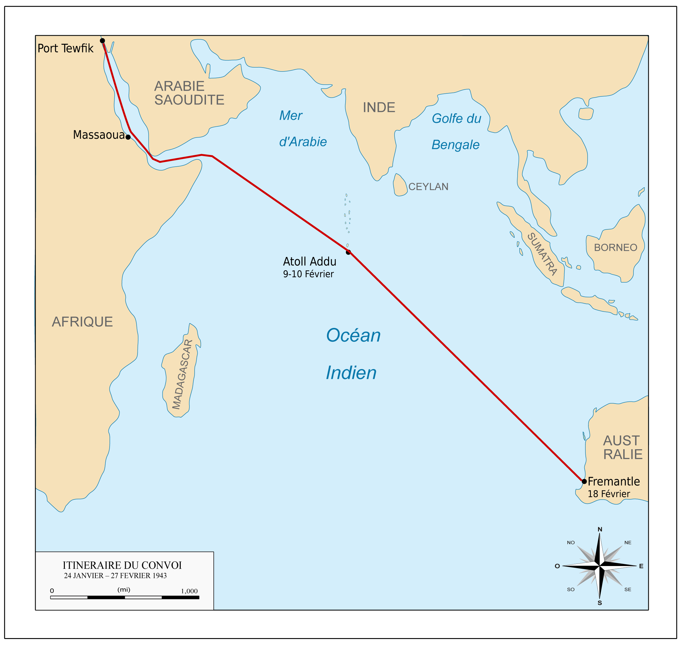 Version française de la carte de l'itinéraire du Convoi Pamphlet.